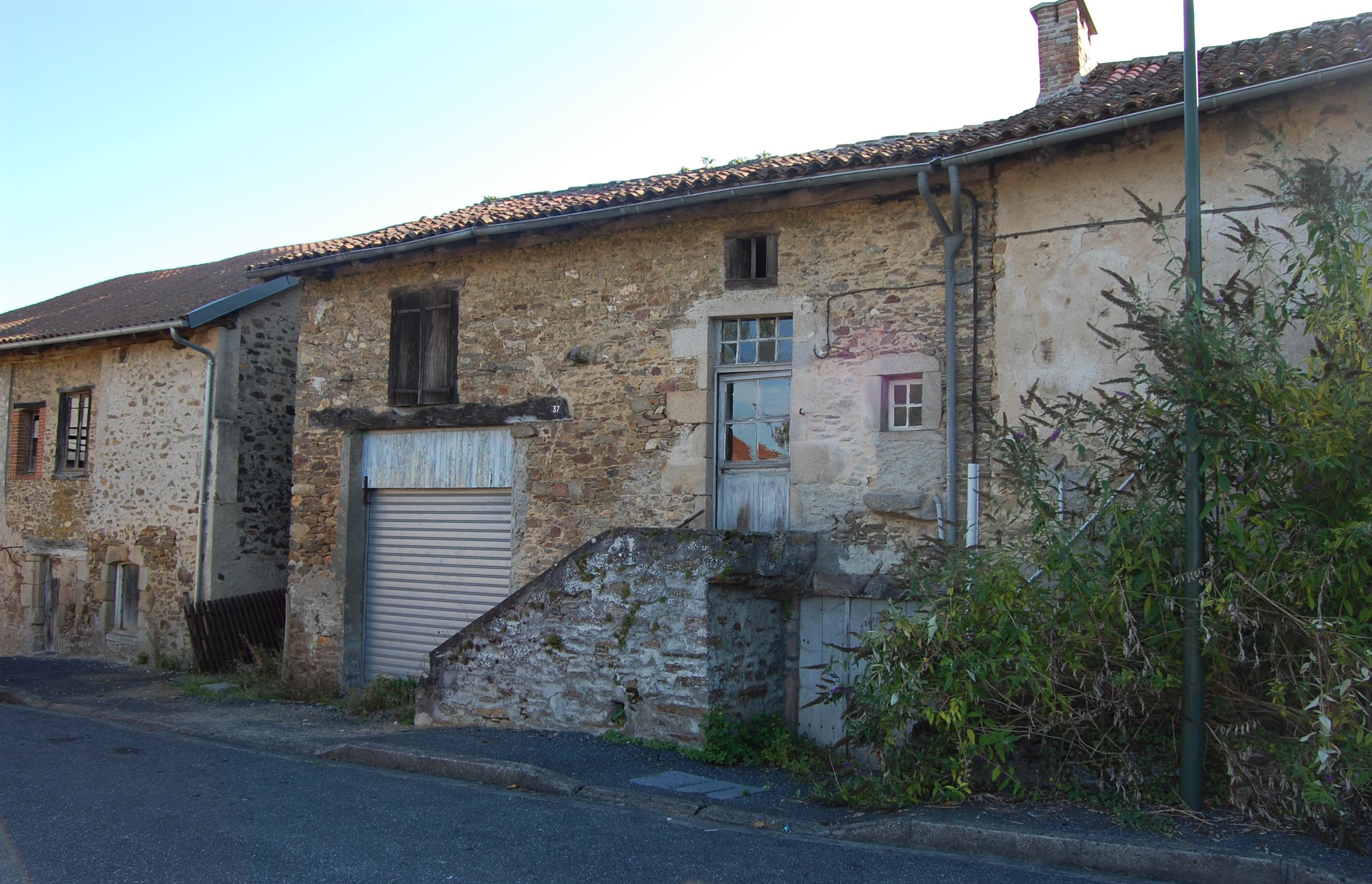 Châlus, maisons anciennes à la Ville Haute